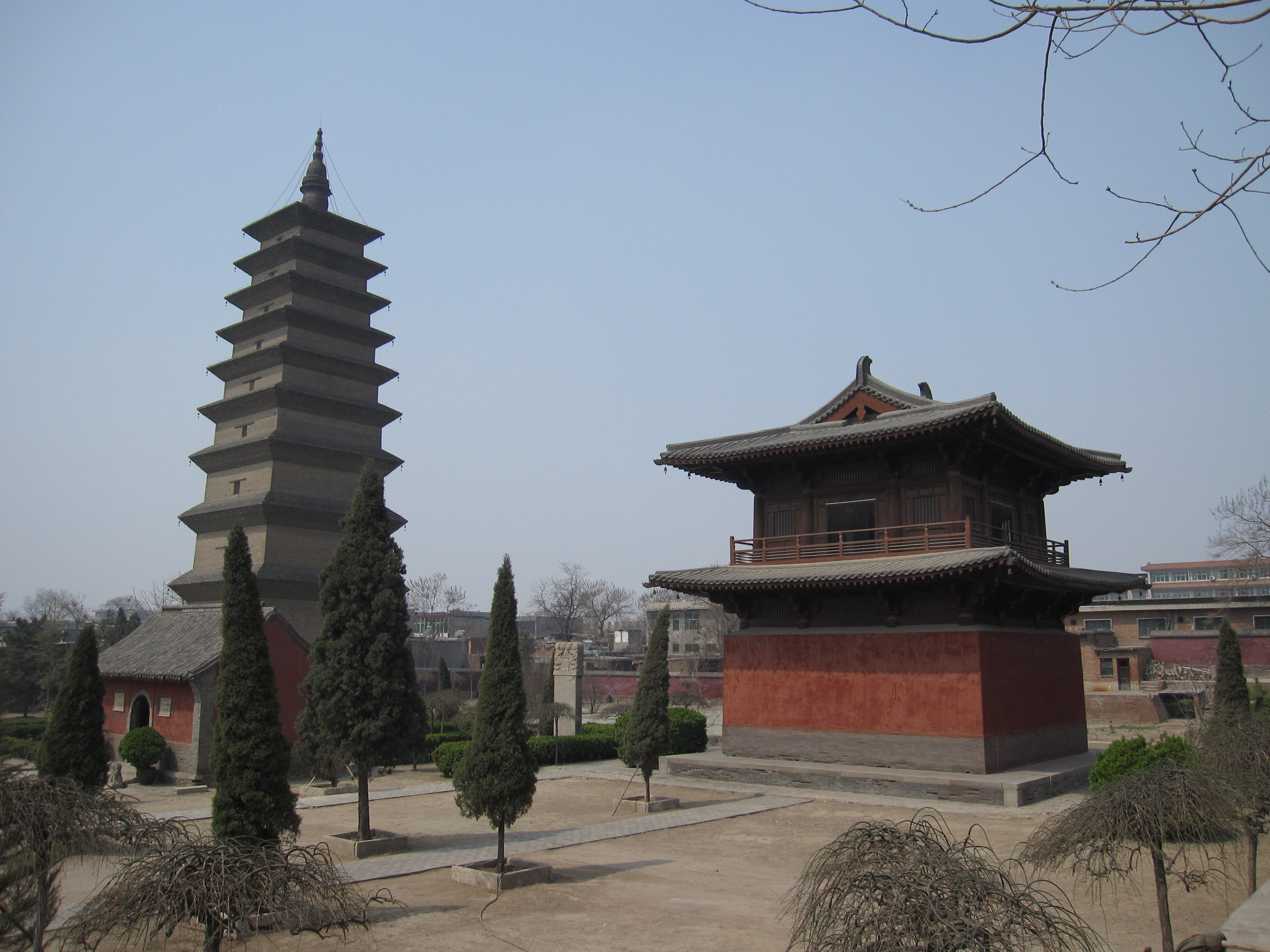 Xumi Pagoda at the Kaiyuan Monastery